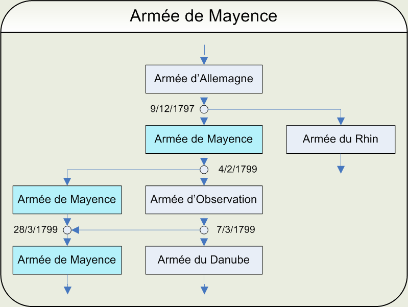 Ordinogramme de l'armée de Mayence